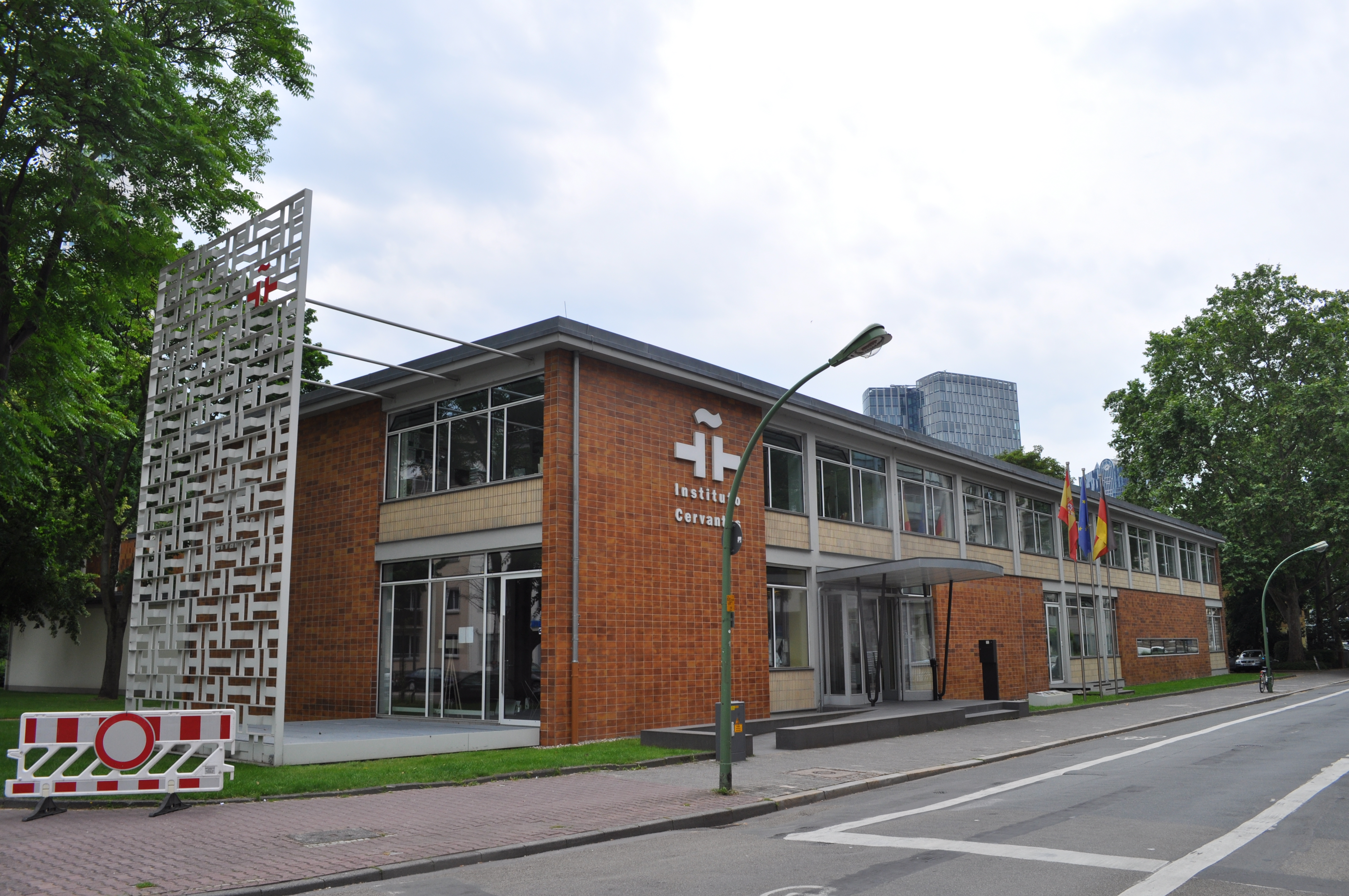 Frankfurt, Instituto Cervantes, früher Amerikahaus